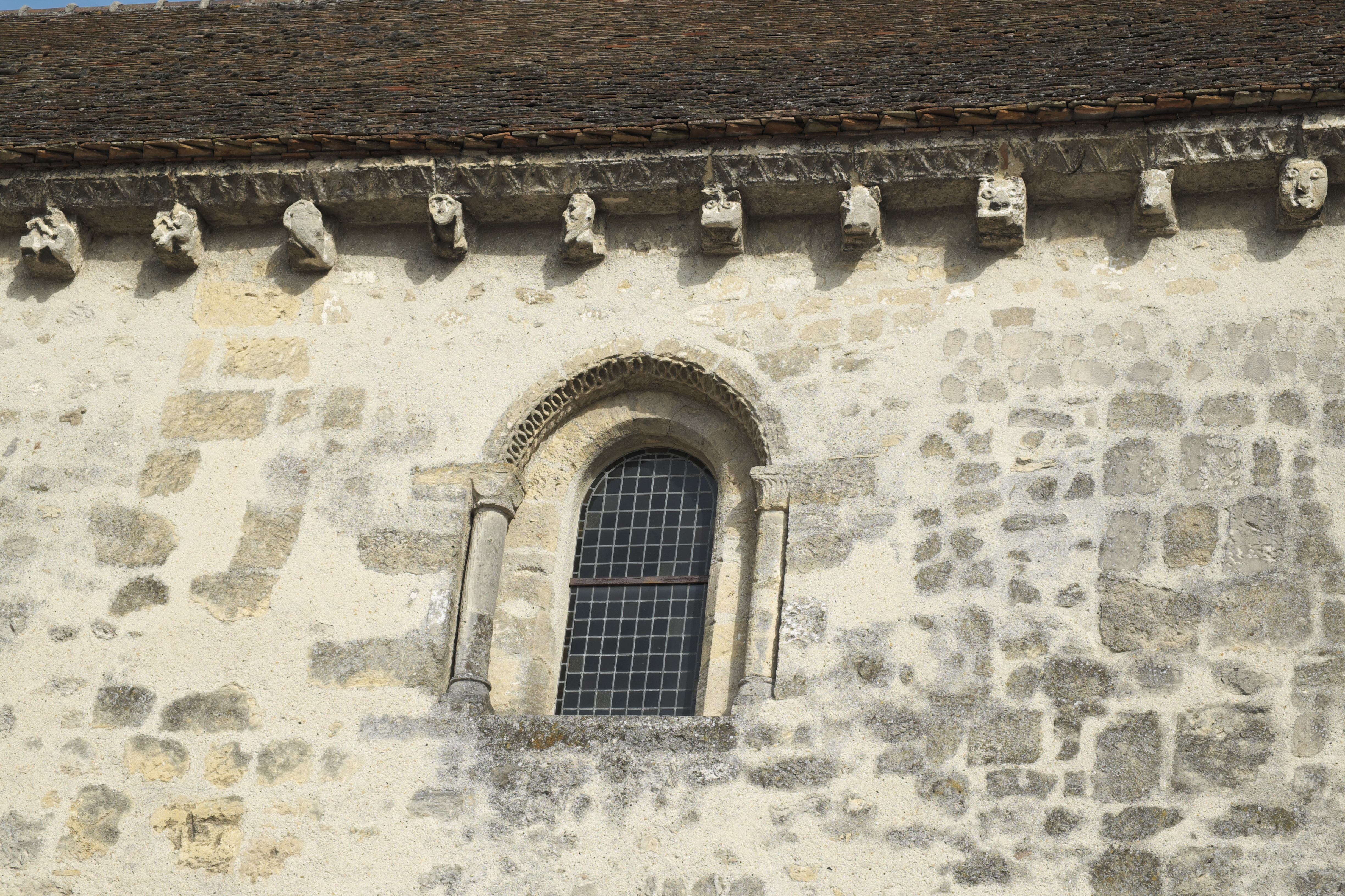 Ehemalige Kirche St-Martin-au-Parvis in Laon im Département Aisne/Picardie (Frankreich), Fenster mit skulptierter Archivolte, Kragsteine unter dem Dachansatz